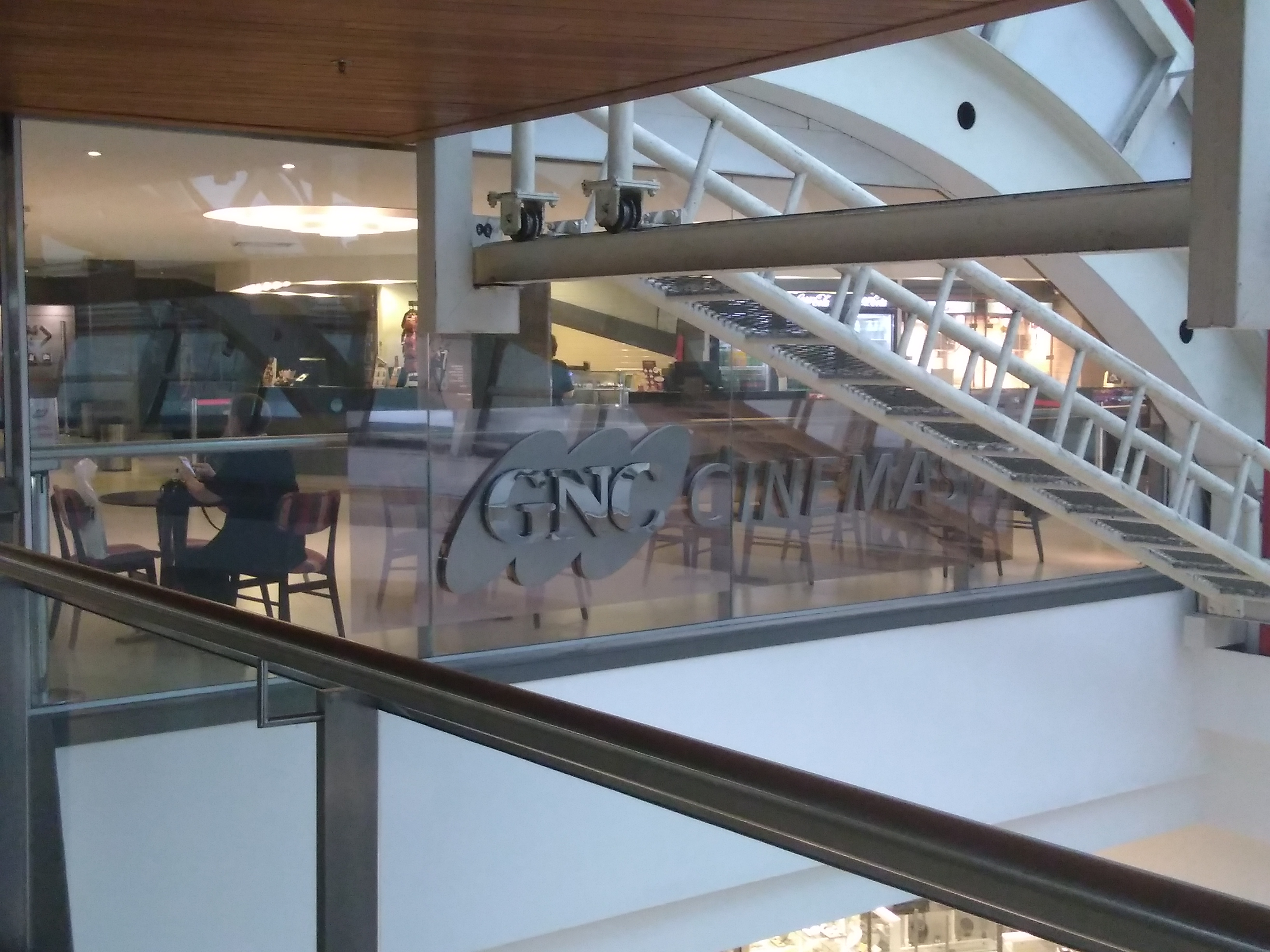 Letreiro de entrada do GNC Moinhos Shopping de Porto Alegre, RS